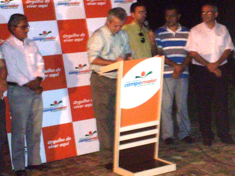 Prefeito de Campo Maior (piauí) assinando documento em ato público em 2010.